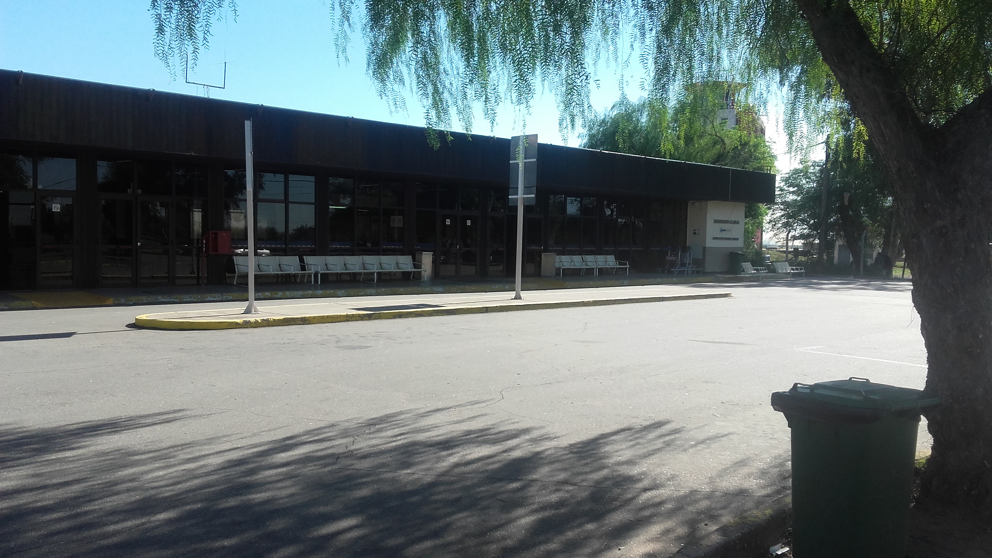 Vista acceso a Aeropuerto Capitán Vicente Almandos Almonacid